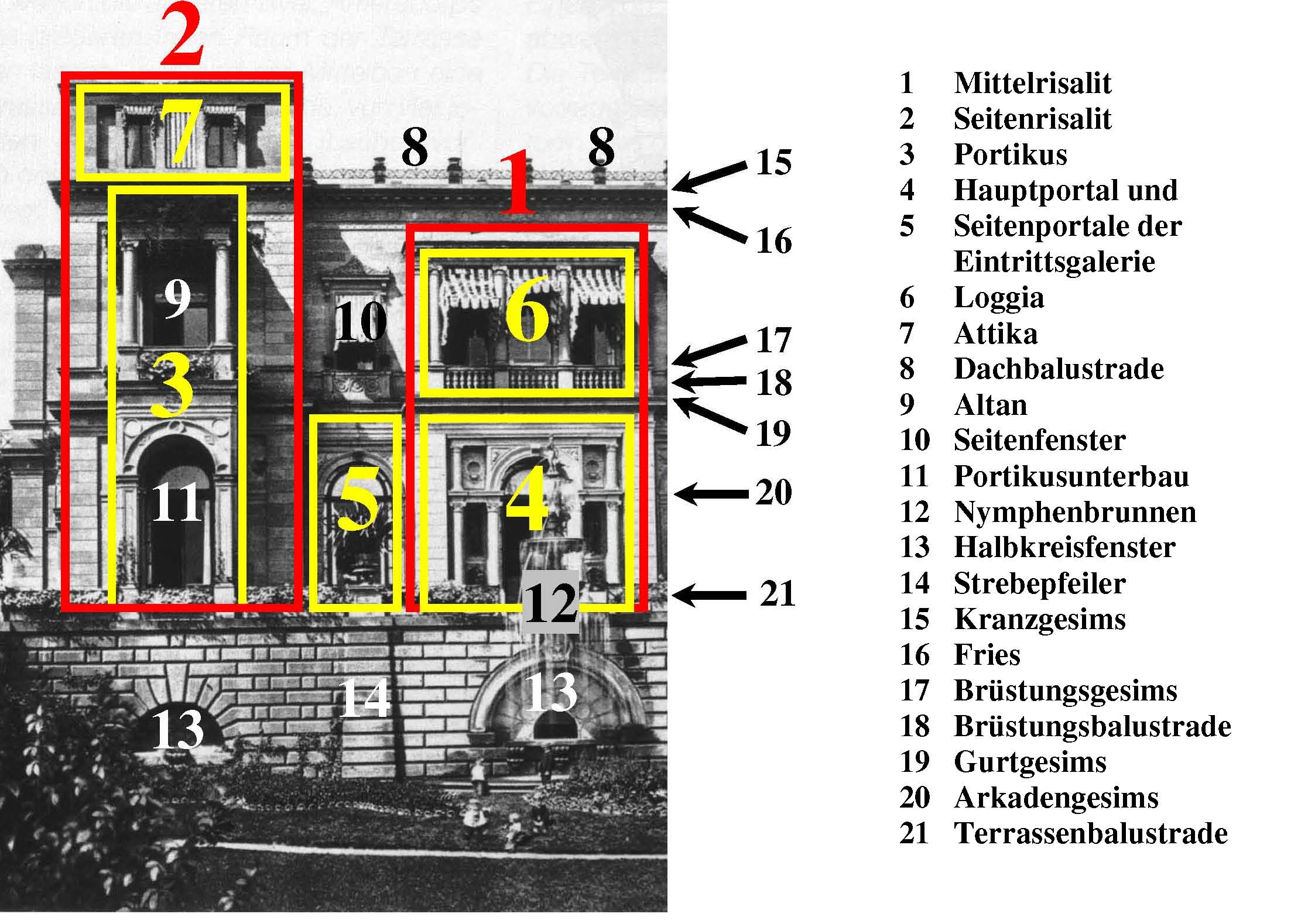 Stuttgart, Villa Berg, Ostfassade, Ansicht um 1870, mit Erklärung der Bauteile.